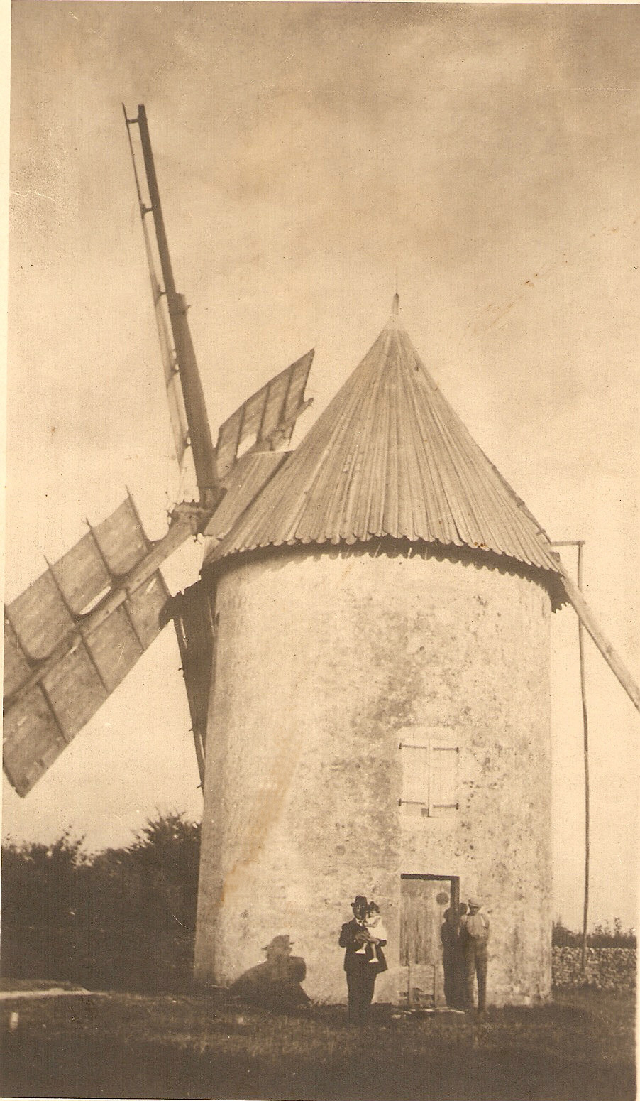 Mon Moulin (à Forges (Charente-Maritime)) avec mon arrière grand-père à droite sur la photo.